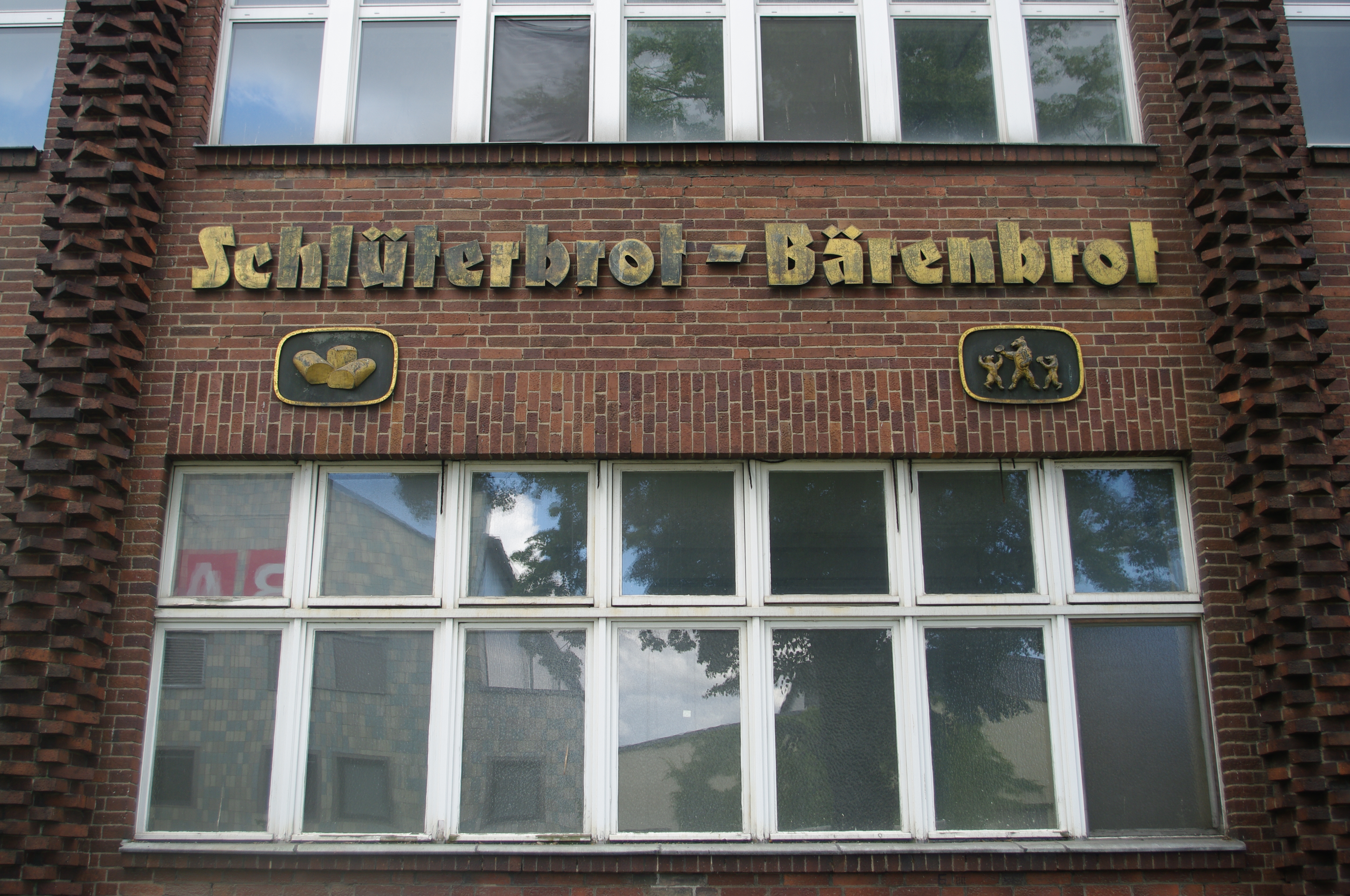 Aufschrift auf der Schlüter-Bärenbrot-Fabrikanlage, 1927-28, Eresburgstraße 24-27